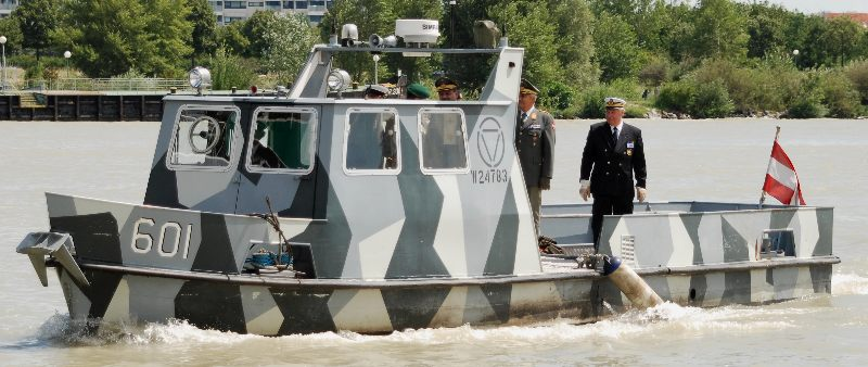 Ehemaliges Bundesheer-Patrouillenboot „Oberst Brecht“ bei der Reichsbrücke in Wien anlässlich der Marinefeier aus Anlass der siegreichen Seeschlacht bei Lissa.